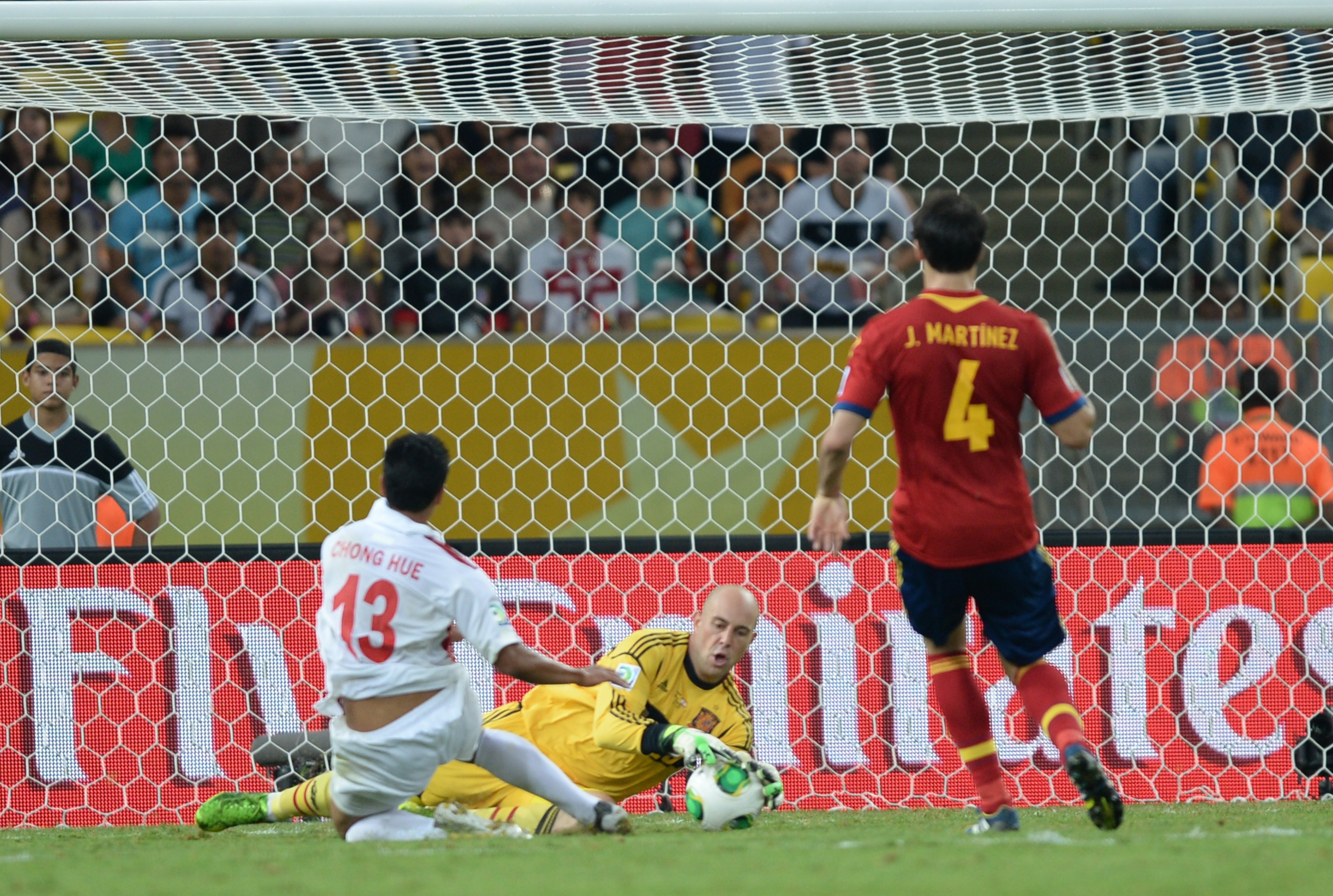 Espanha e Taiti se enfrentam na Copa das Confederações 2013